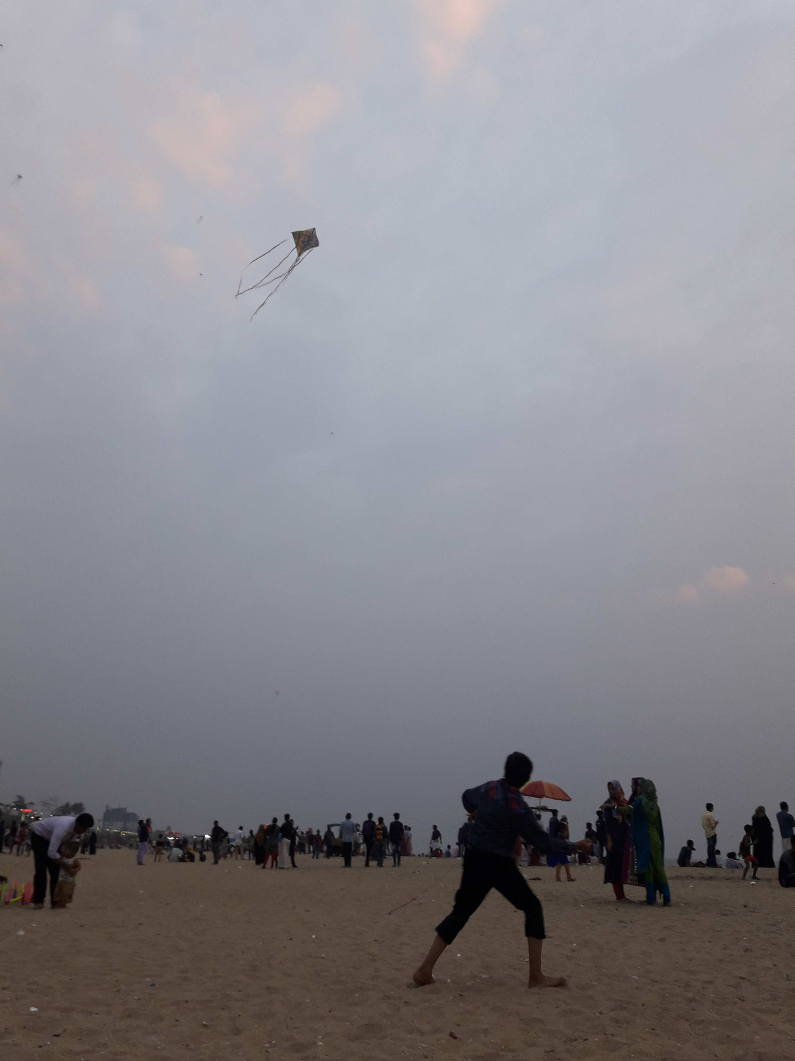 kite in kozhikode